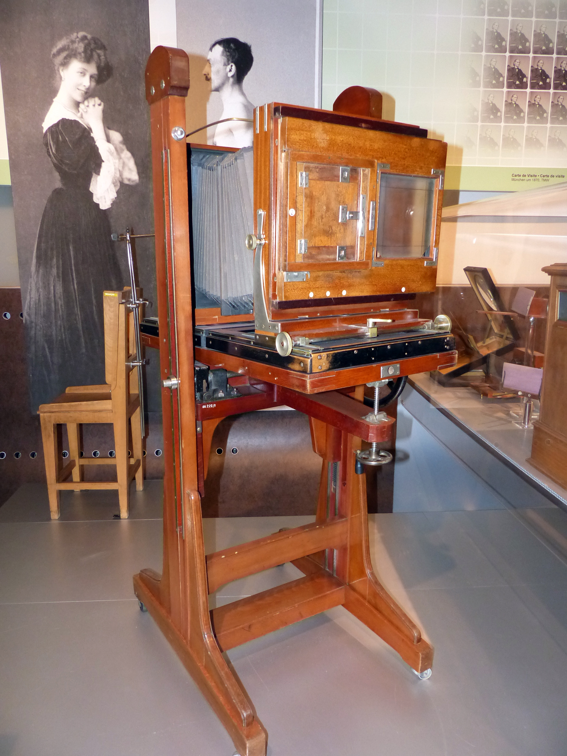 Atelierkamera Goldmann, Herlango, Wien, um 1920; Exponat im Technischen Museum Wien